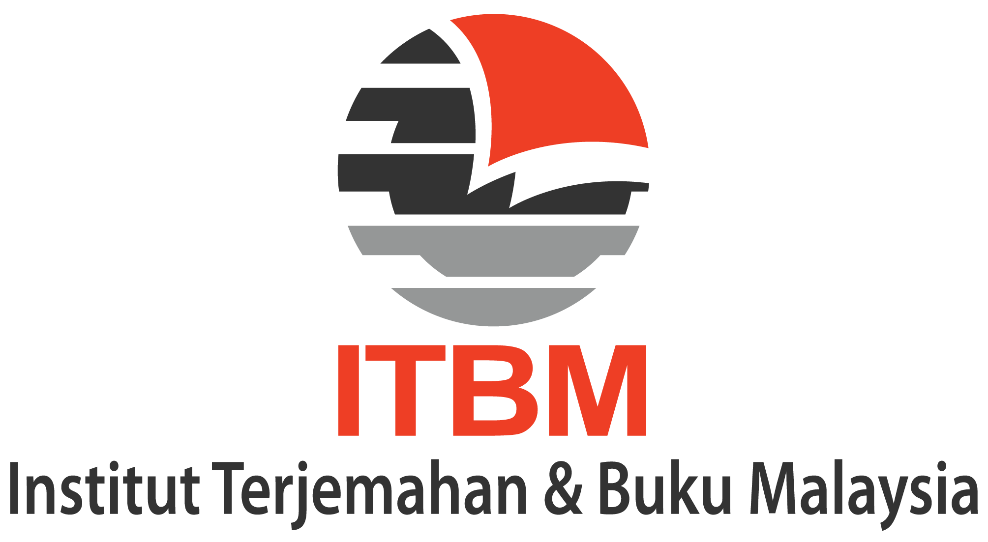 Logo rasmi ITBM selepas penaiktarafan daripada ITNM pada Disember 2011 oleh Perdana Menteri, YAB Dato' Seri Mohd Najib Tun Abdul Razak.